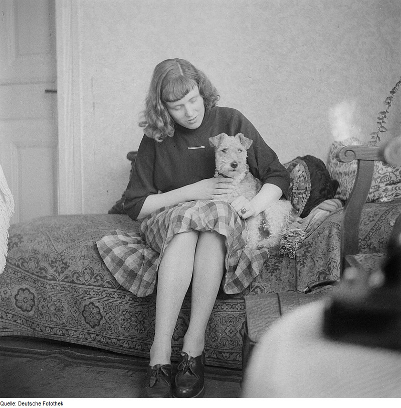 Original image description from the Deutsche Fotothek Renate Rössing mit Hund auf einem Sofa sitzend